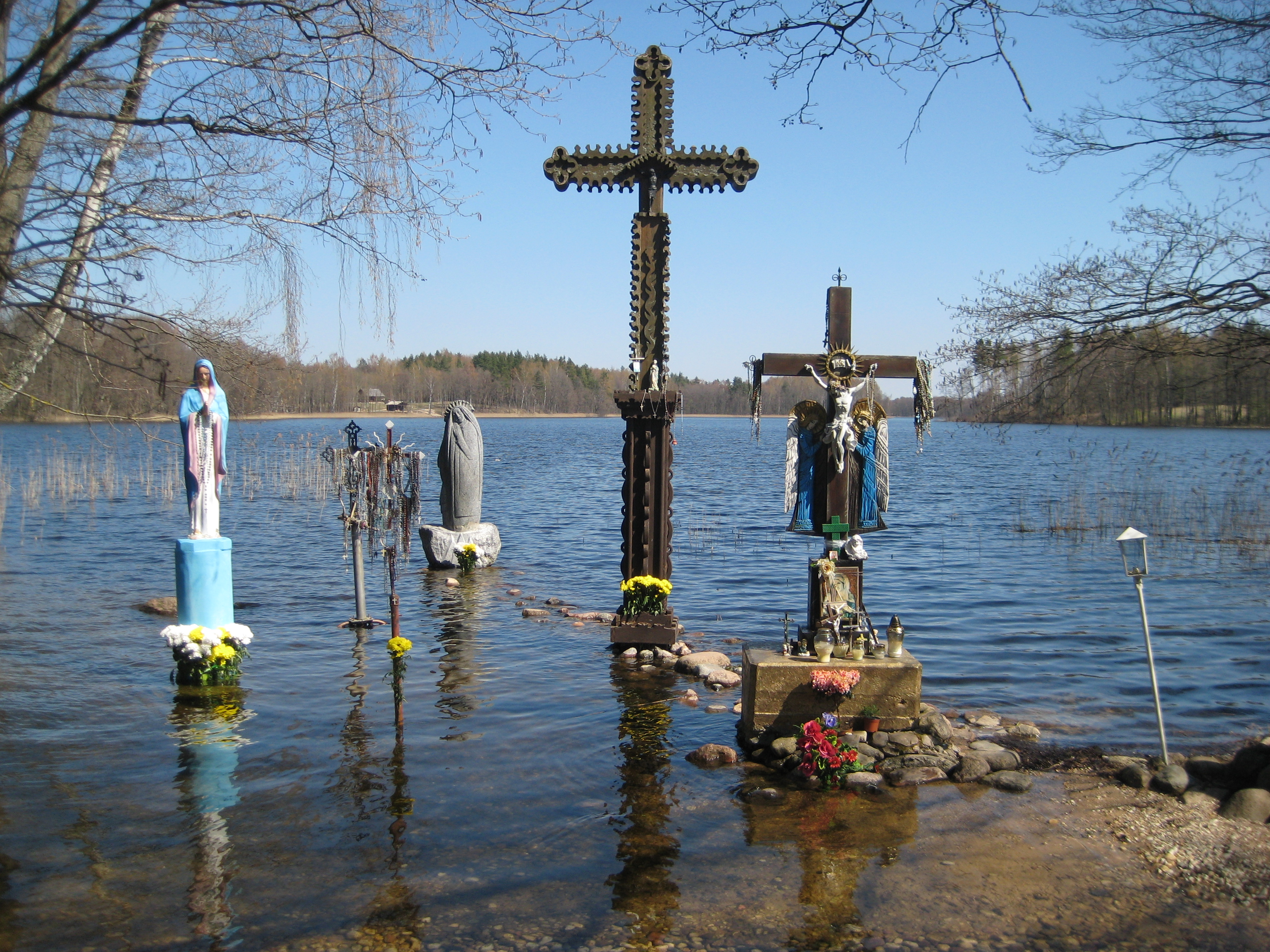 Imbrado sen., Lithuania